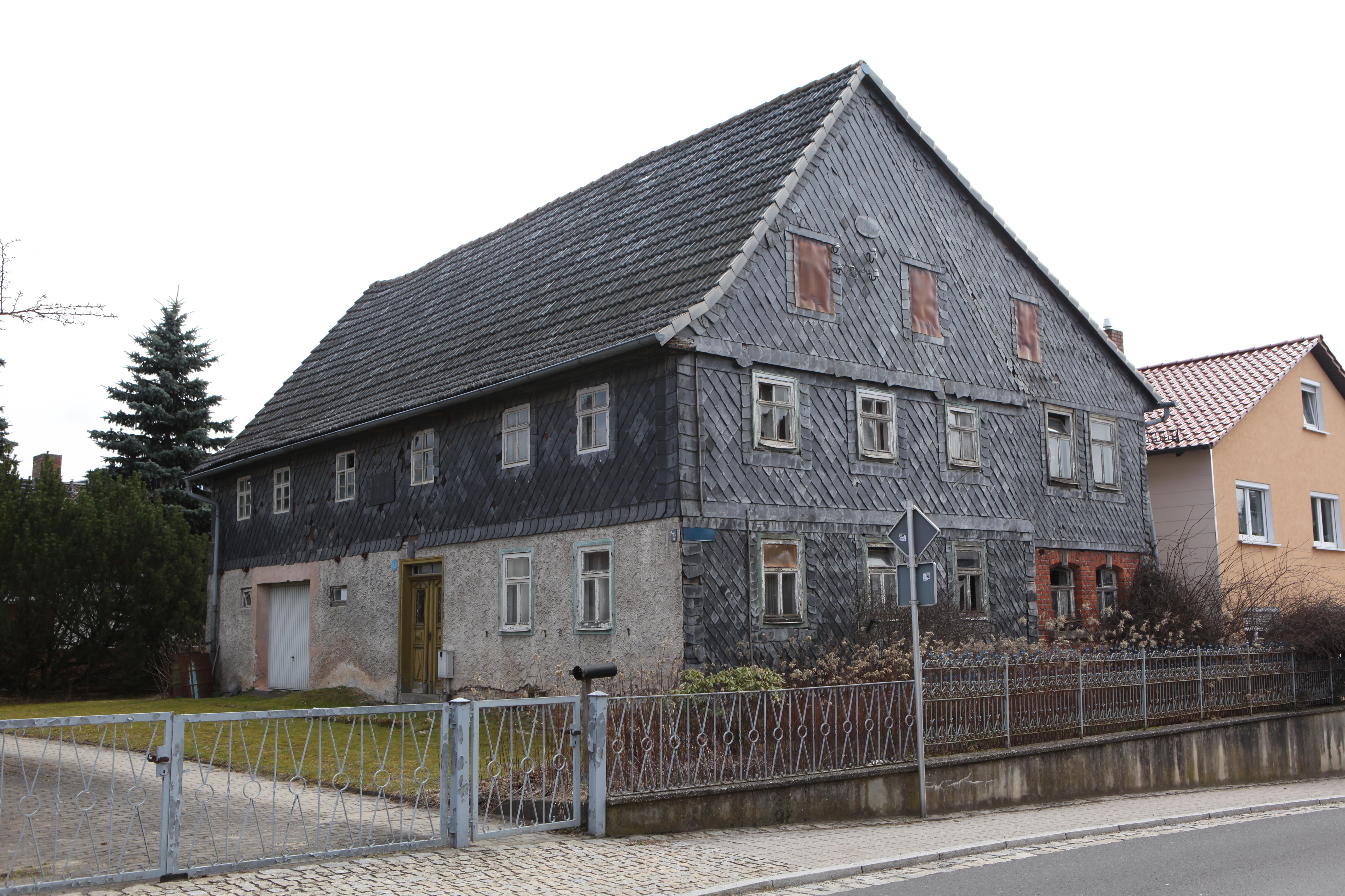 Zweigeschossiges Fachwerkhaus, Obergeschoss verschiefert, bez. 1854, Kellergasse 1 in Frohnlach, Landkreis Coburg